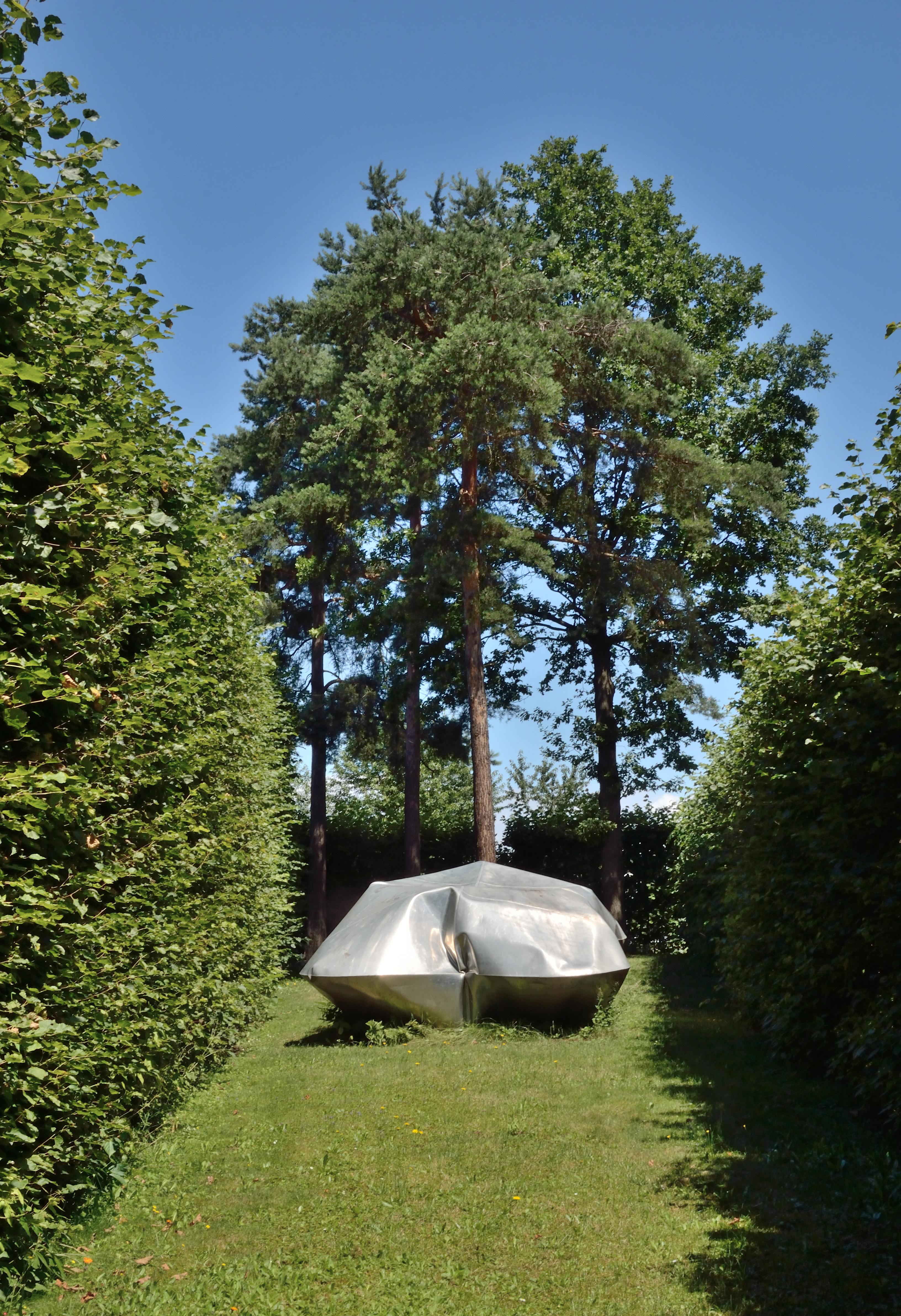 Gonflable 6 von Hans Kupelwieser im Österreichischen Skulpturenpark in Premstetten / Kalsdorf bei Graz. Die Skulptur stammt aus dem Jahre 2002.